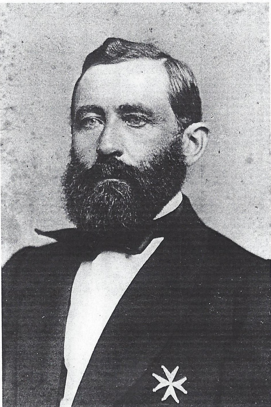 Porträtfotografie von Hugo von Graevenitz